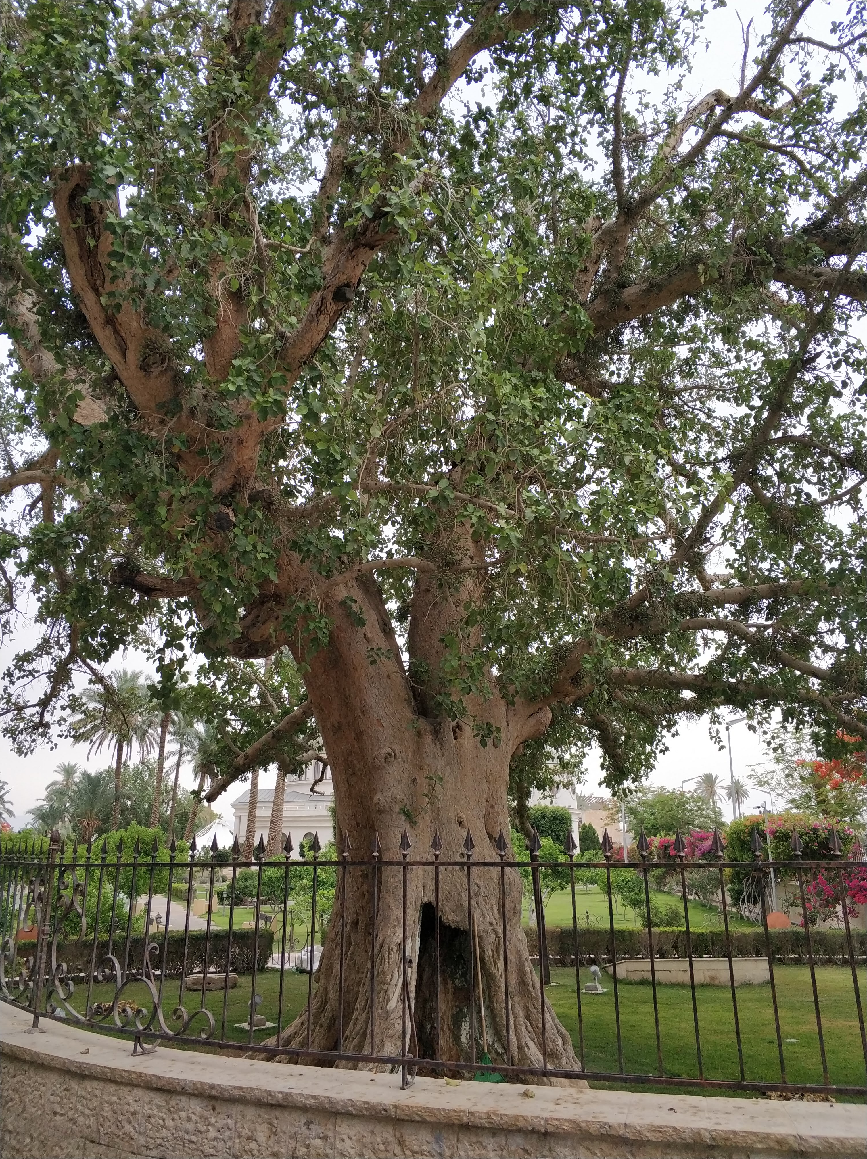 השקמה של זכאוס ביריחו